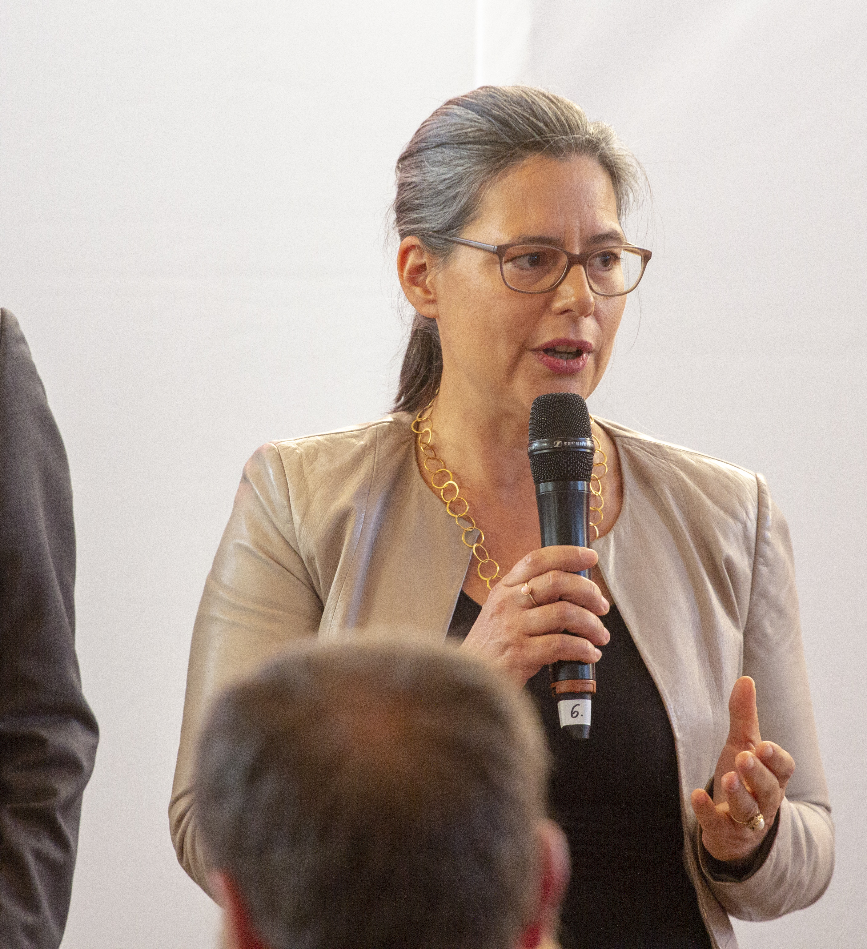 Nina Scheer bei der SPD Regionalkonferenz zur Wahl des SPD-Vorsitzes am 10. September 2019 in Nieder-Olm.